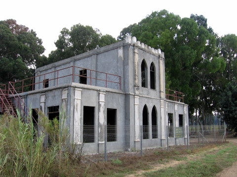 beton בית הבטון